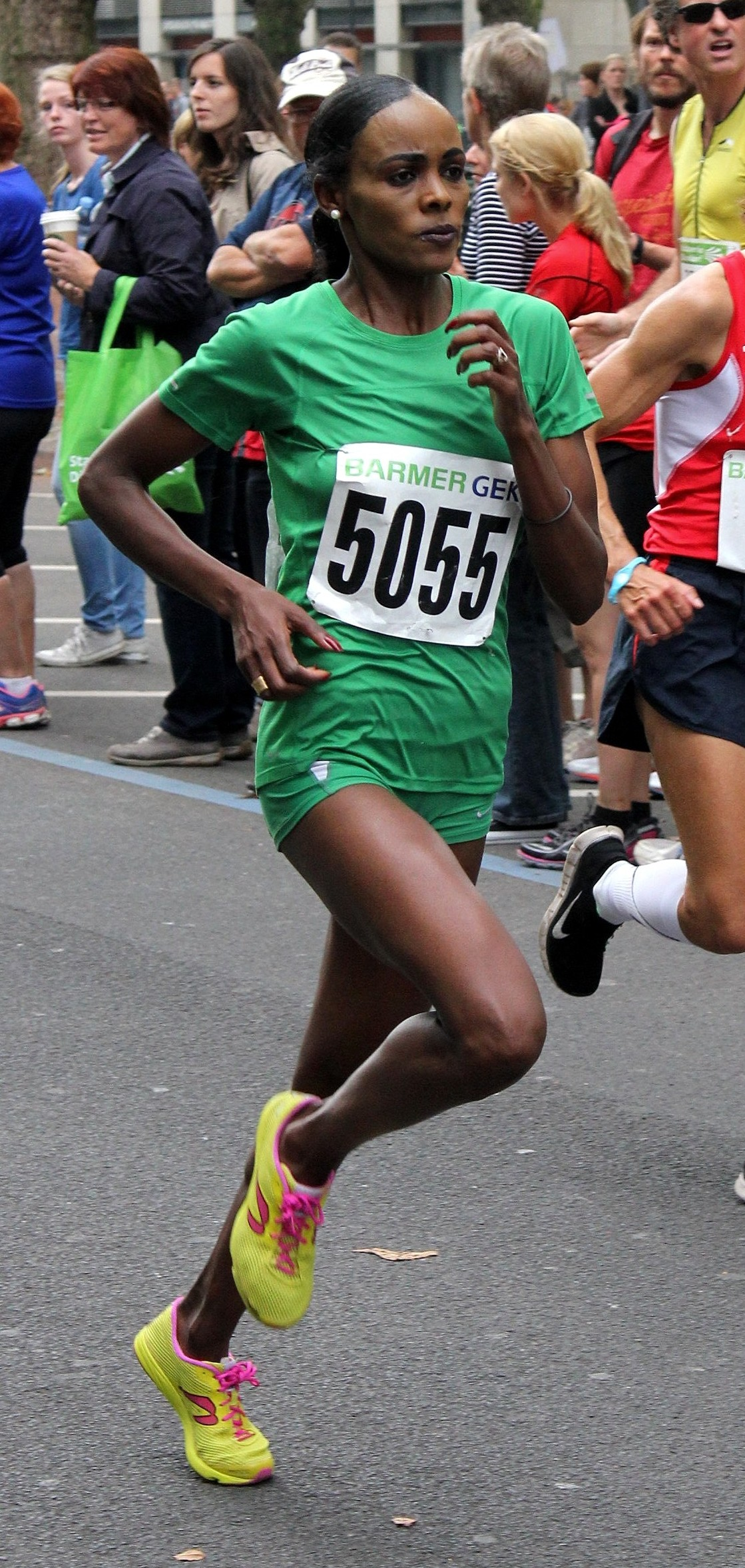 Kö-Lauf 2014, Deutsche Straßenlaufmeisterschaften 10 km